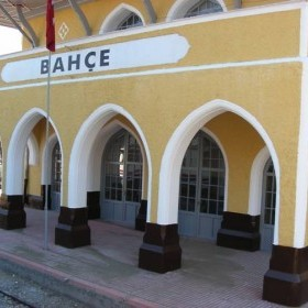 osmaniye bahçe'nin tren istasyonu